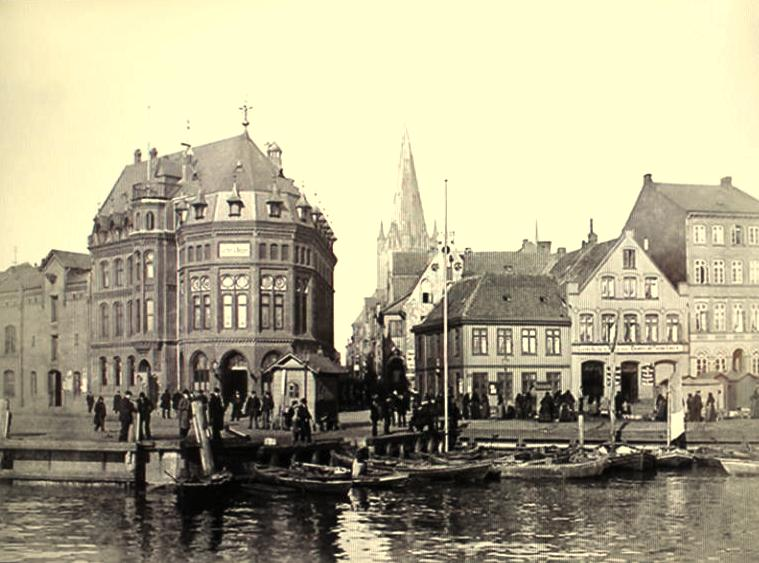 Alter Speicher von Sartori & Berger in Kiel um 1890